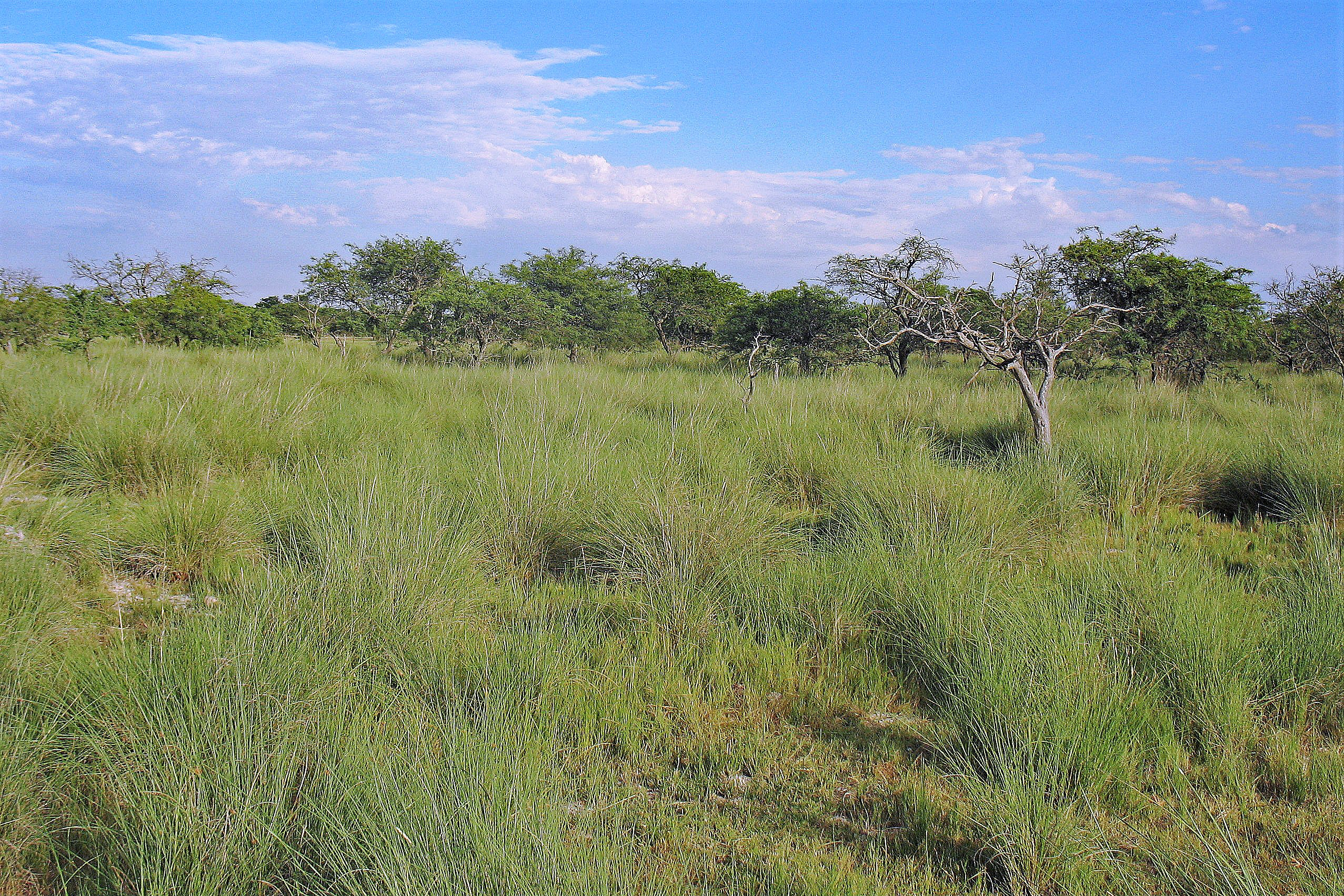 Testimonio gráfico del espinal